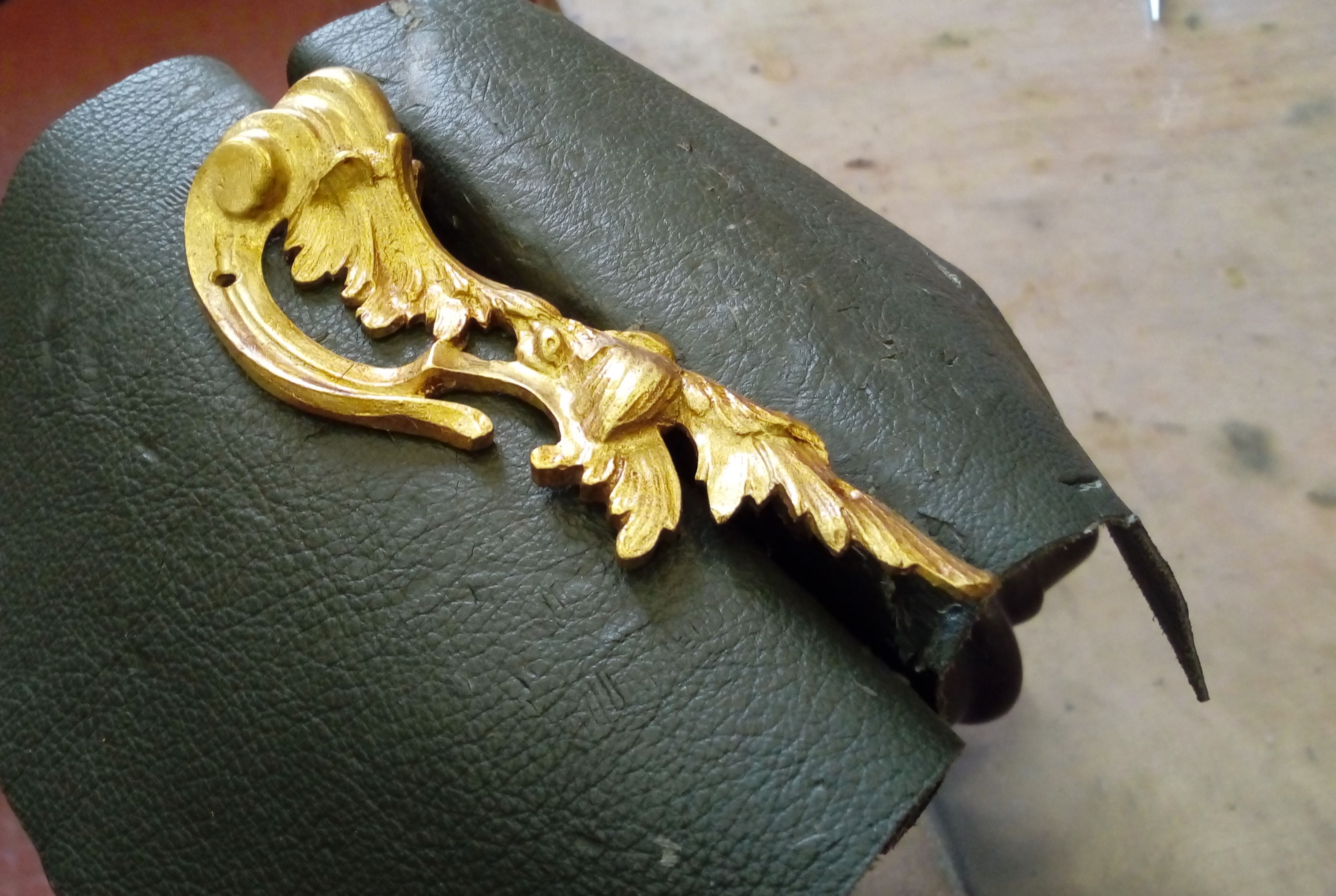 Les mordaches servent à tenir l'objet pendant son travail de réparure ; l'objet est protégé par l'intermédiaire d'un cuir.